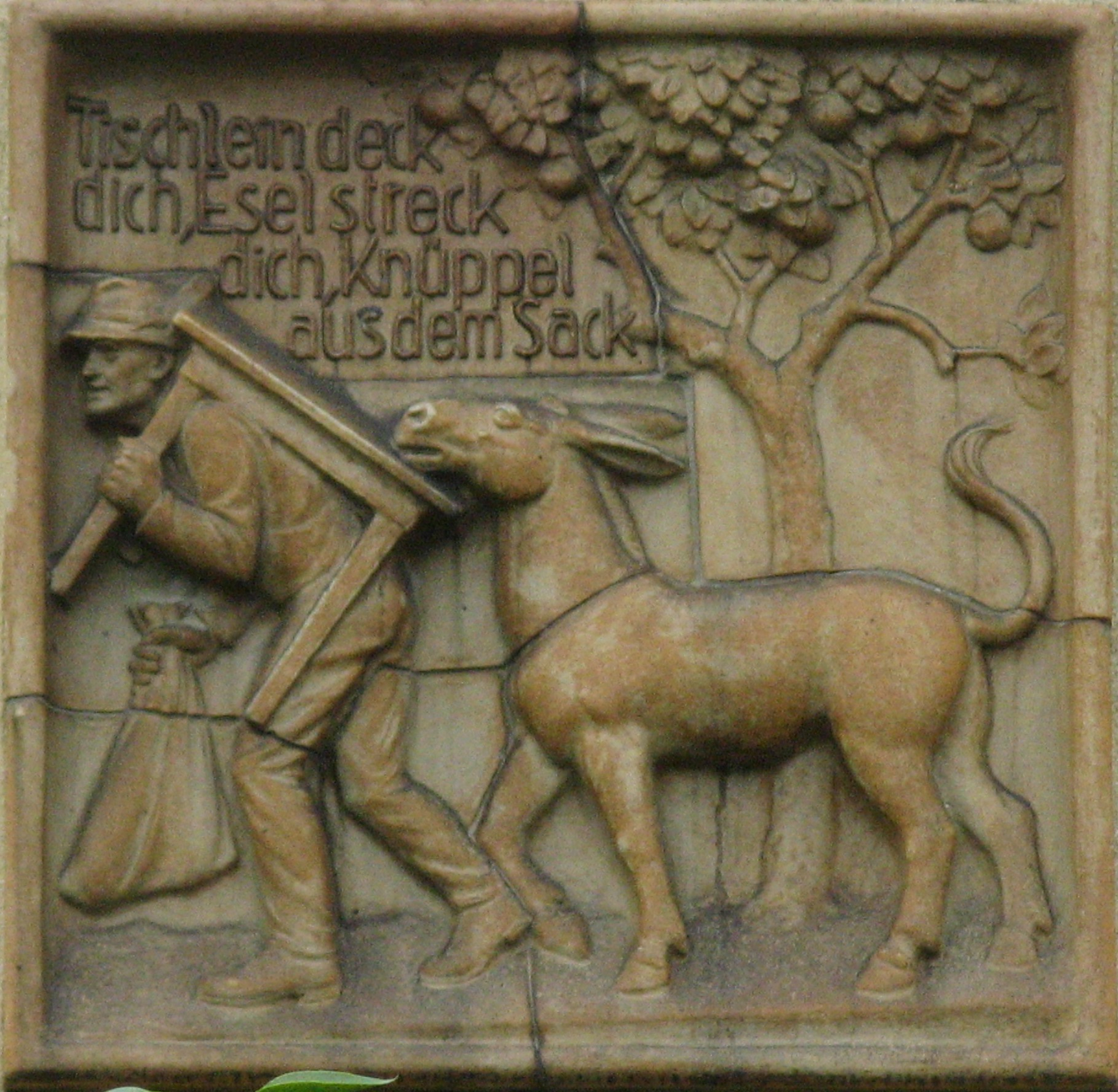 Tischlein deck dich (um 1939), Terrakottarelief, Johann-Mithlinger-Siedlung, Raxstraße 7-27, Wien-Favoriten